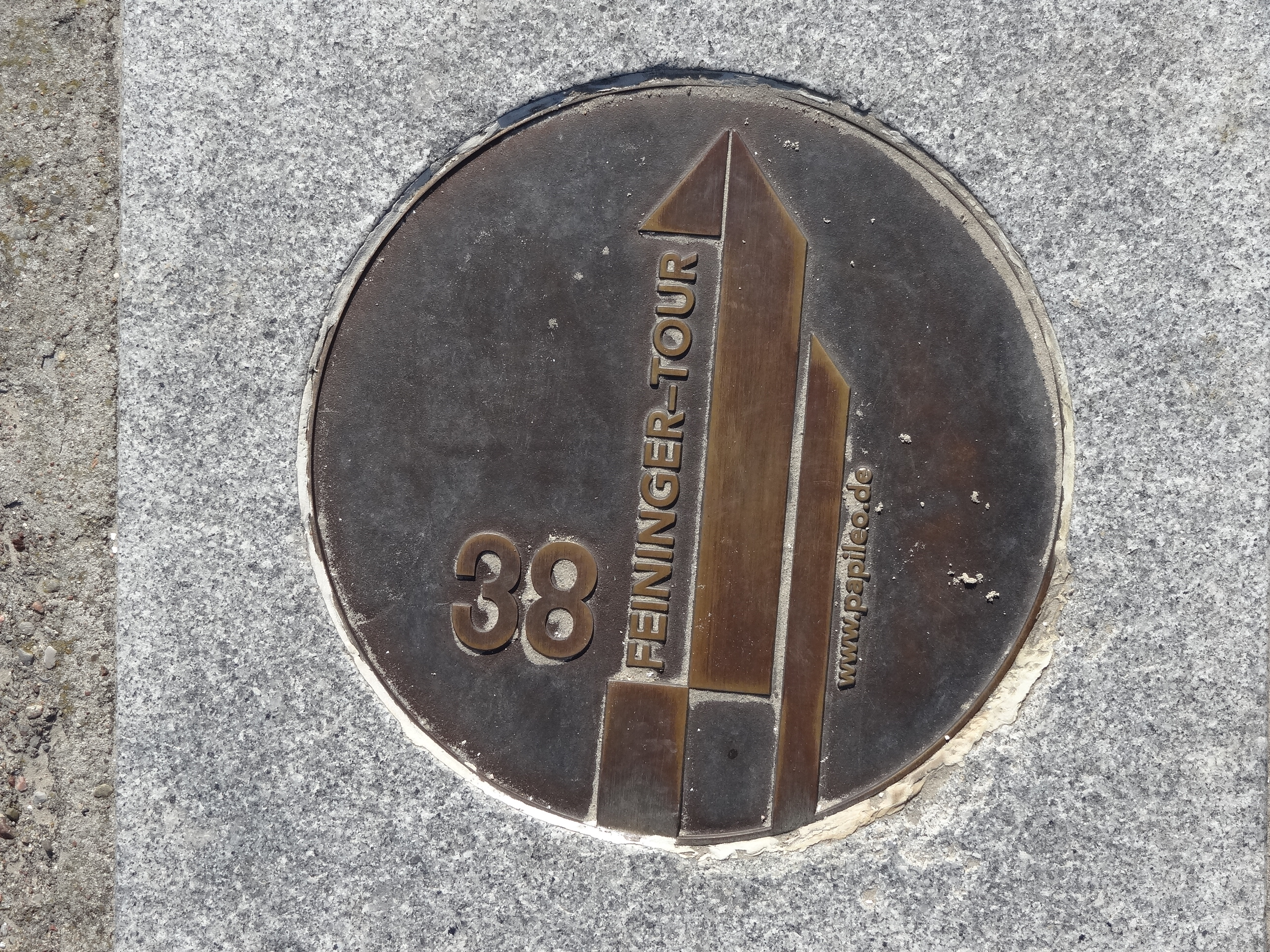 Feininger-Tour 38, Stawa Młyny, Świnoujście, Uznam